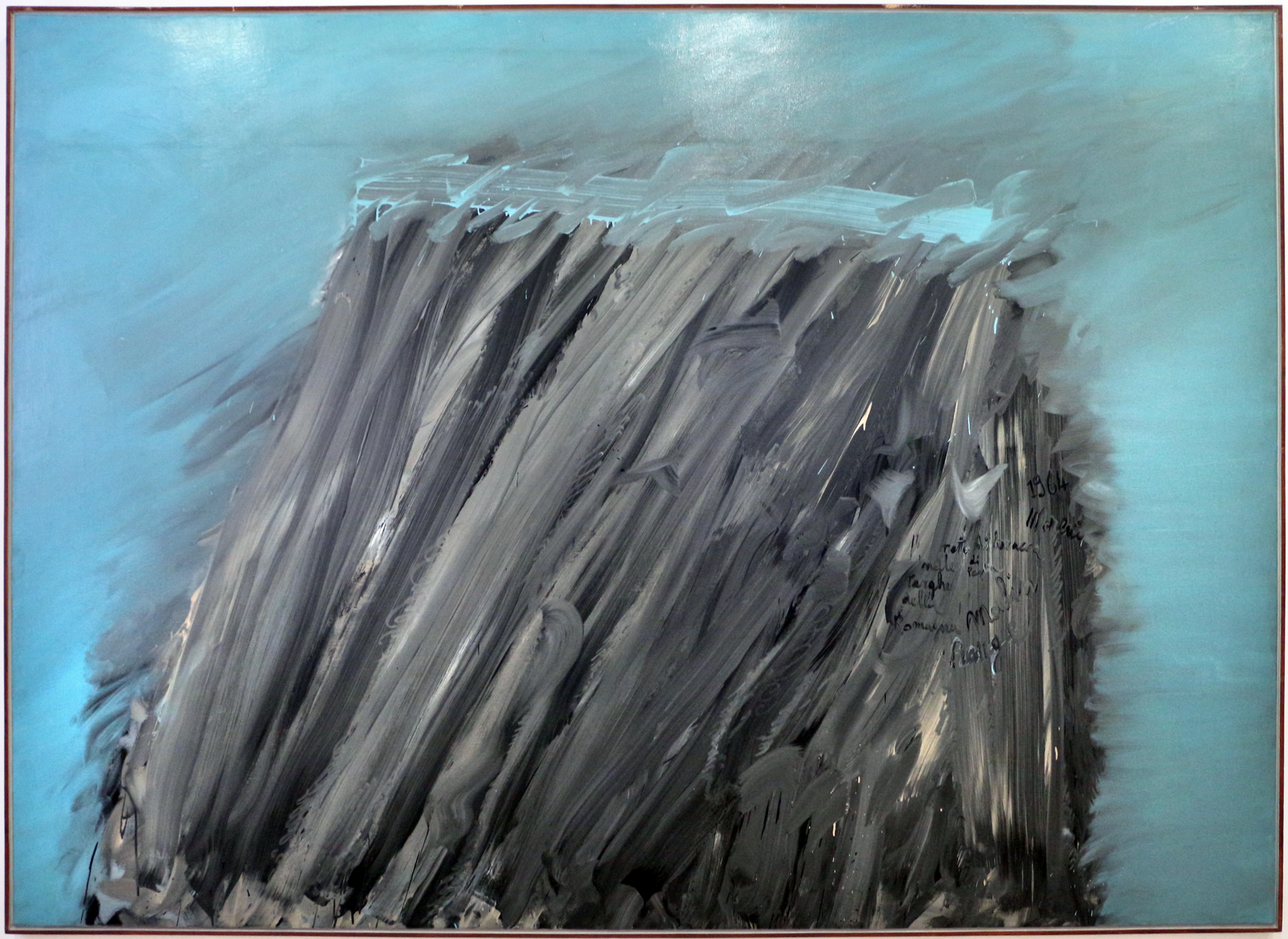 Collezione Mosaici Moderni - NB: Museum explicitly authorized the upload of its contemporary art collection for WLM 2016 (for further info ask WLM Italy organizators). This is a photo of a monument which is part of cultural heritage of Italy.